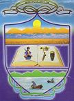 Escudo del municipio de Repelon Atlantico.